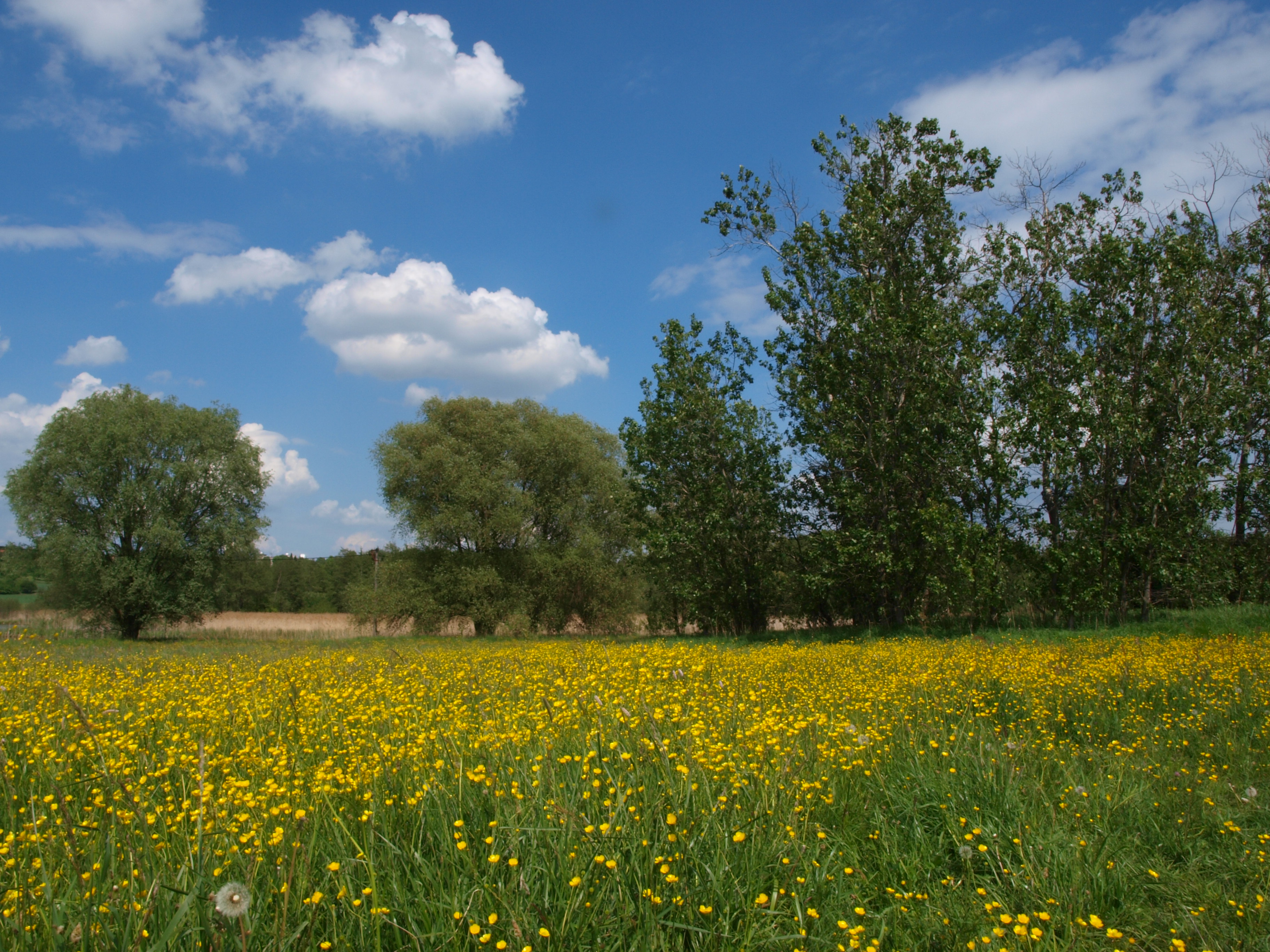 Vlhké louky PP Roudnička a Datlík, v sousedství intravilánu Roudničky, květen 2011.